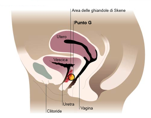 illustrazione con vista sagittale dell'apparato riproduttivo femminile umano nella quale è stato evidenziato il punto G.